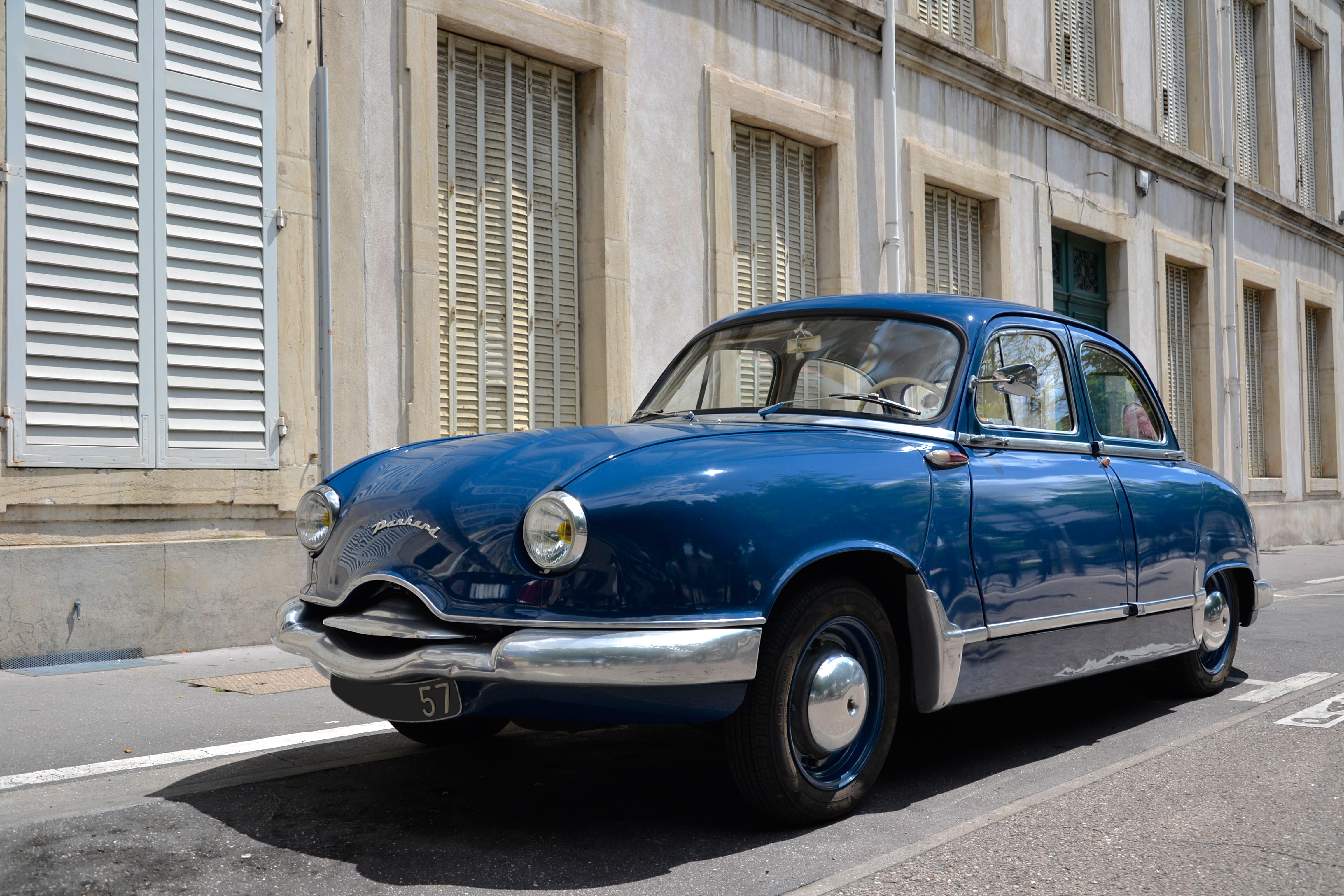 Panhard Dyna Z